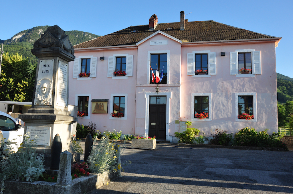 La mairie de Saint-Laurent (Haute-Savoie, France) avec son monument aux morts.